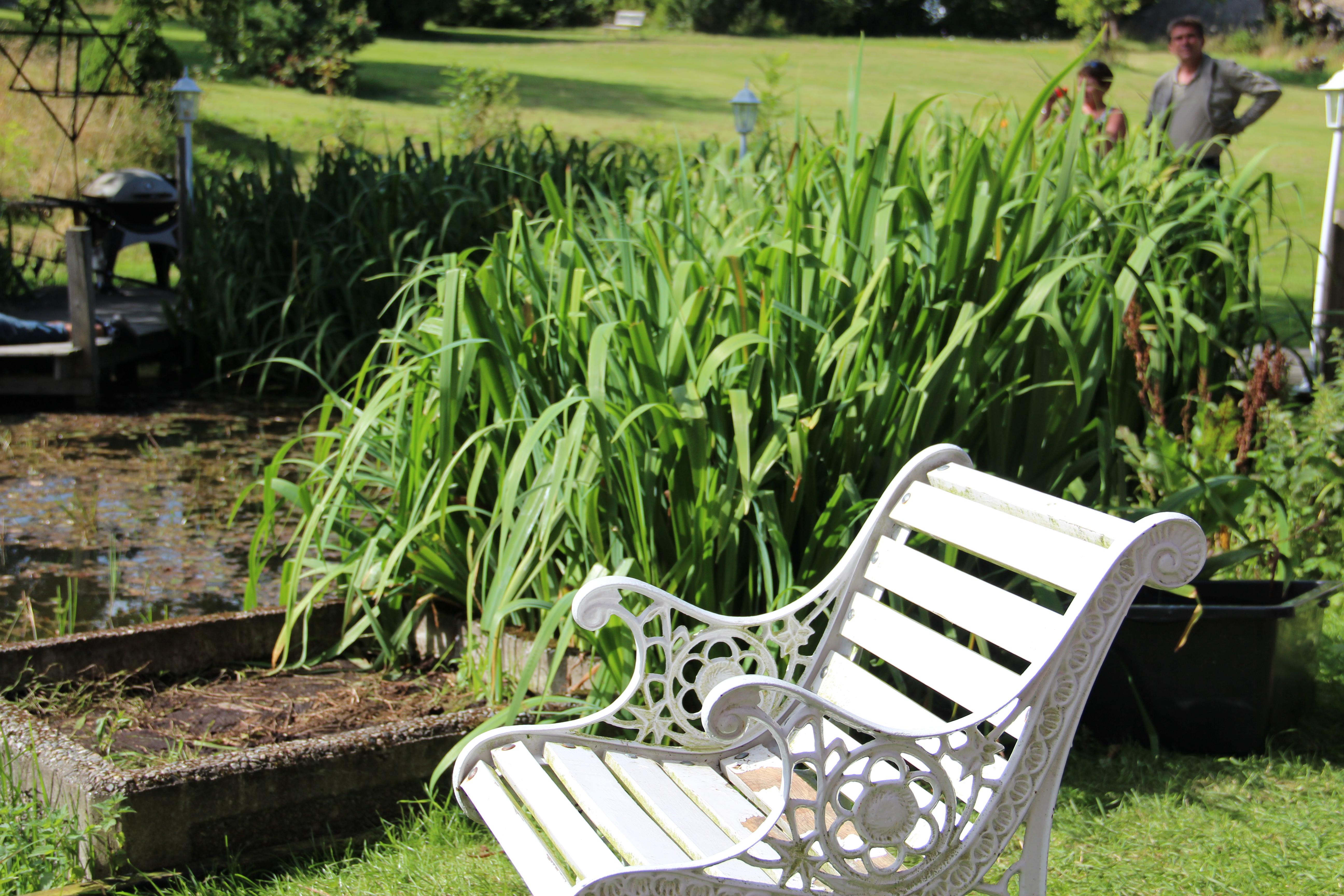 Hagen